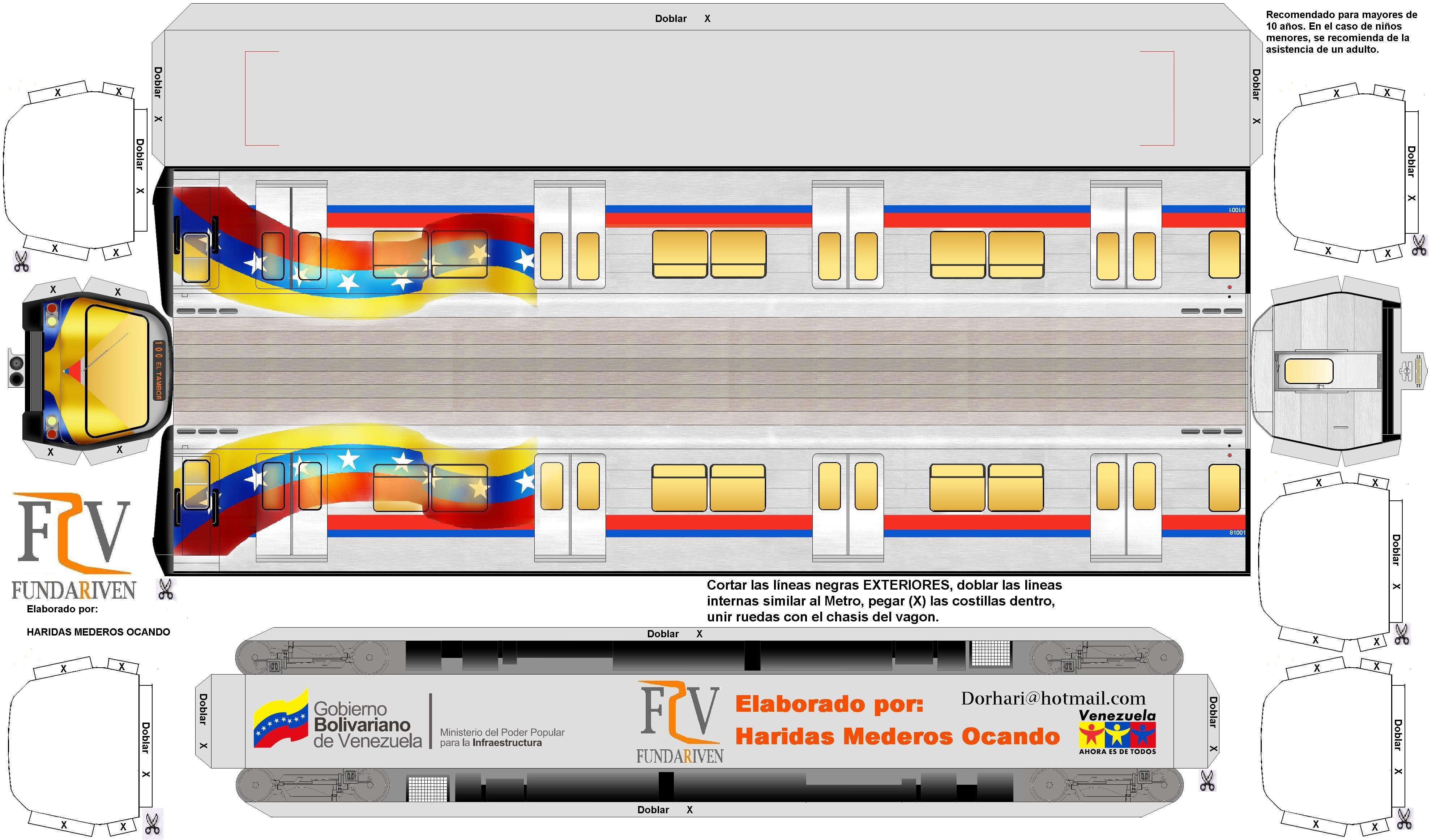 Metro de Los Teques con Bandera de Venezuela